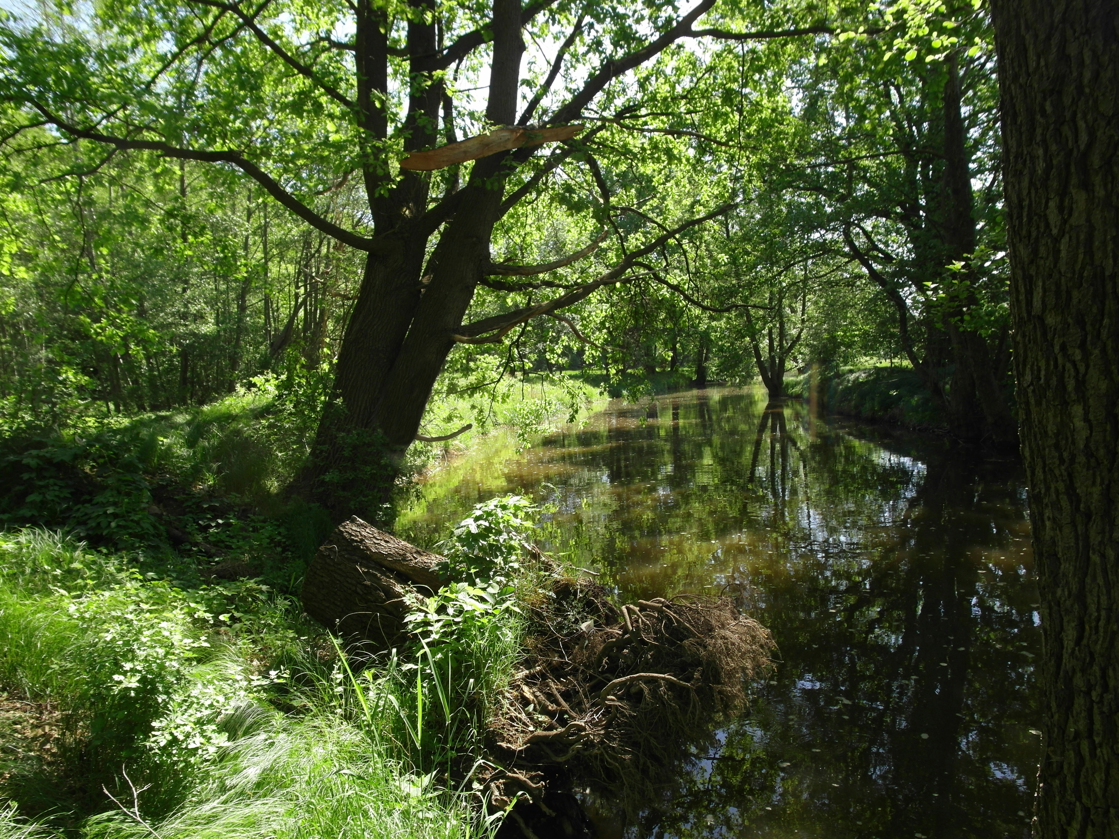 07.05.2018 01471 Radeburg: Röderaue, Blick vom Nordufer der Großen Röder flußaufwärts nach Südosten etwa bei GMP: 51.218588,13.731610. [SAM5939.JPG]20180507195DR.JPG(c)Blobelt